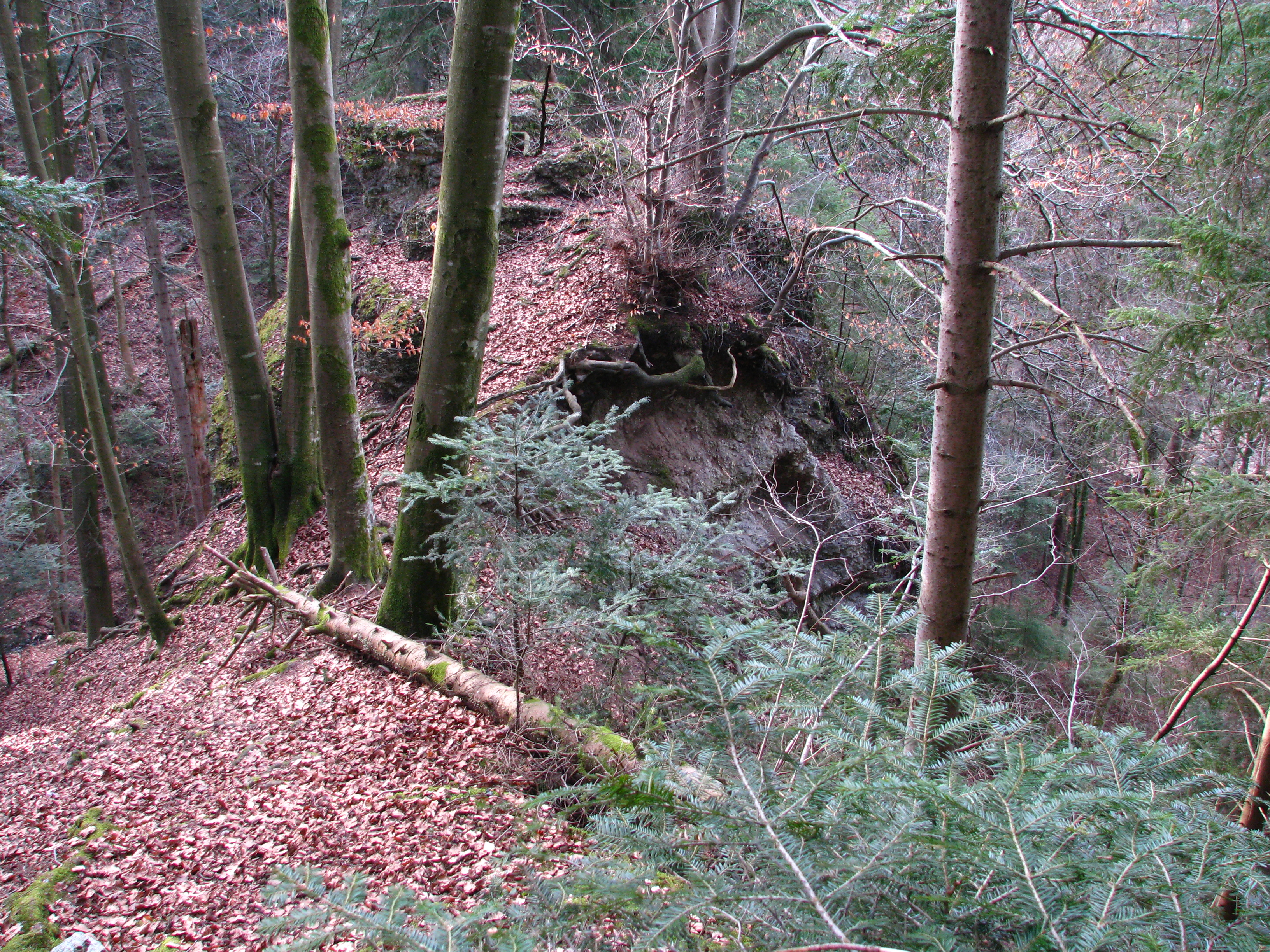 Heidenburg in Seegräben-Sack (Switzerland)